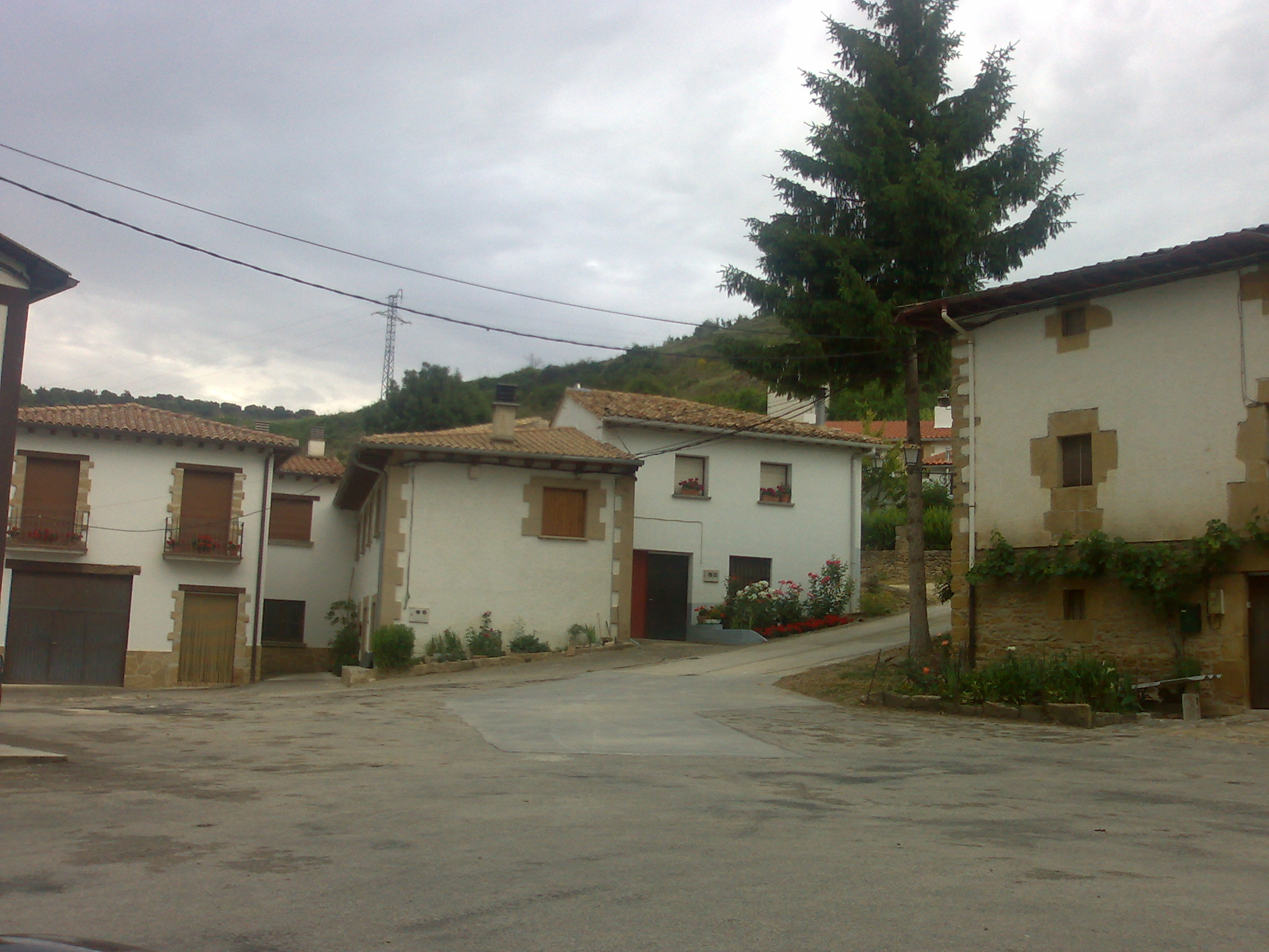 Leozko Olleta kontzejuaren ikuspegia.